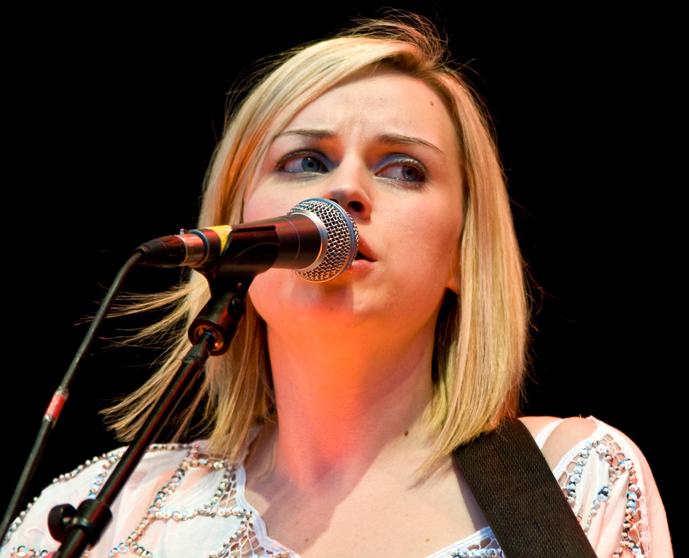 Amy MacDonald at Gröna Lund, Stockholm